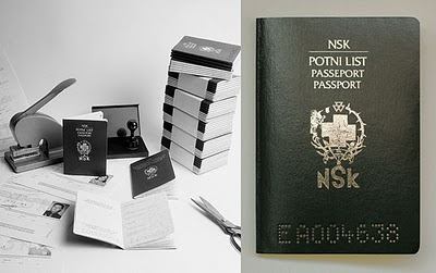 Pass des virtuellen NSK-Staates (Kunstobjekt)